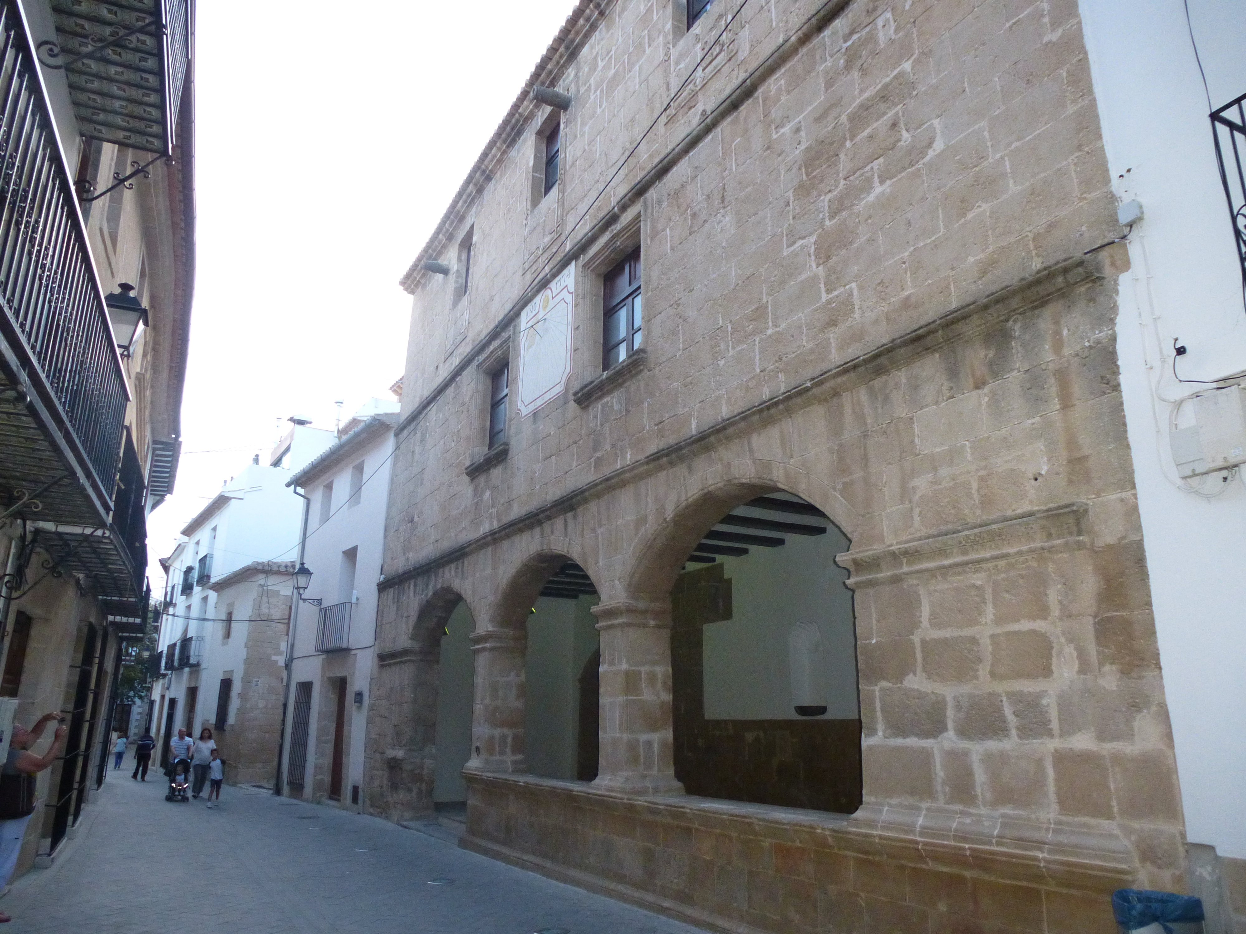 rue de benissa